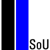 Symbol der SoU